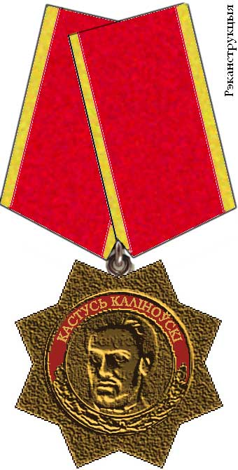 Беларуская (тарашкевіца): Ордэн Кастуся Каліноўскага (рэканструкцыя). Зробленая паводле афіцыйнага апісаньня ўзнагароды ва ўказе прэзідэнта Рэспублікі Беларусь "Аб зацьверджаньні апісаньняў ордэнаў, медалёў і нагрудных знакаў да ганаровых званьняў Рэспублкі Беларусь" ад 15.01.1996